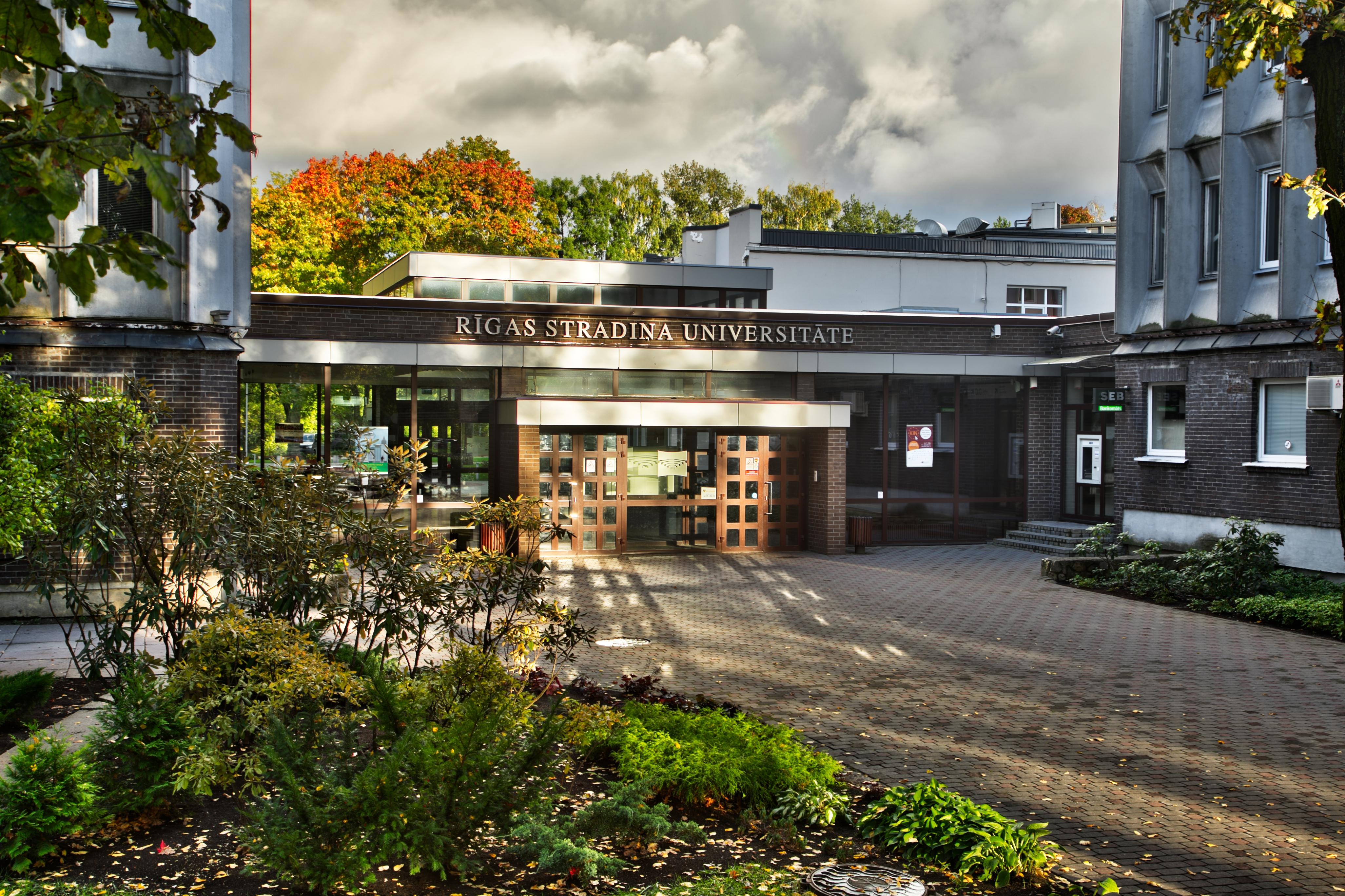 Rīgas Stradiņa universitāte (Dzirciema iela 16)